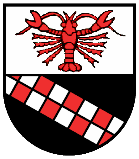 Wappen von Spöck, Gde. Ostrach, Baden-Württemberg, Deutschland